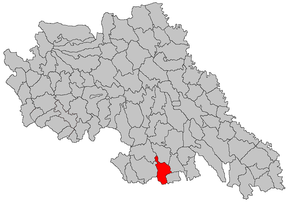 Categorie:Hărţi ale judeţului Iaşi